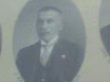 Lic. Jesús Zafra G.. Foto tomada para el Senado Mexicano